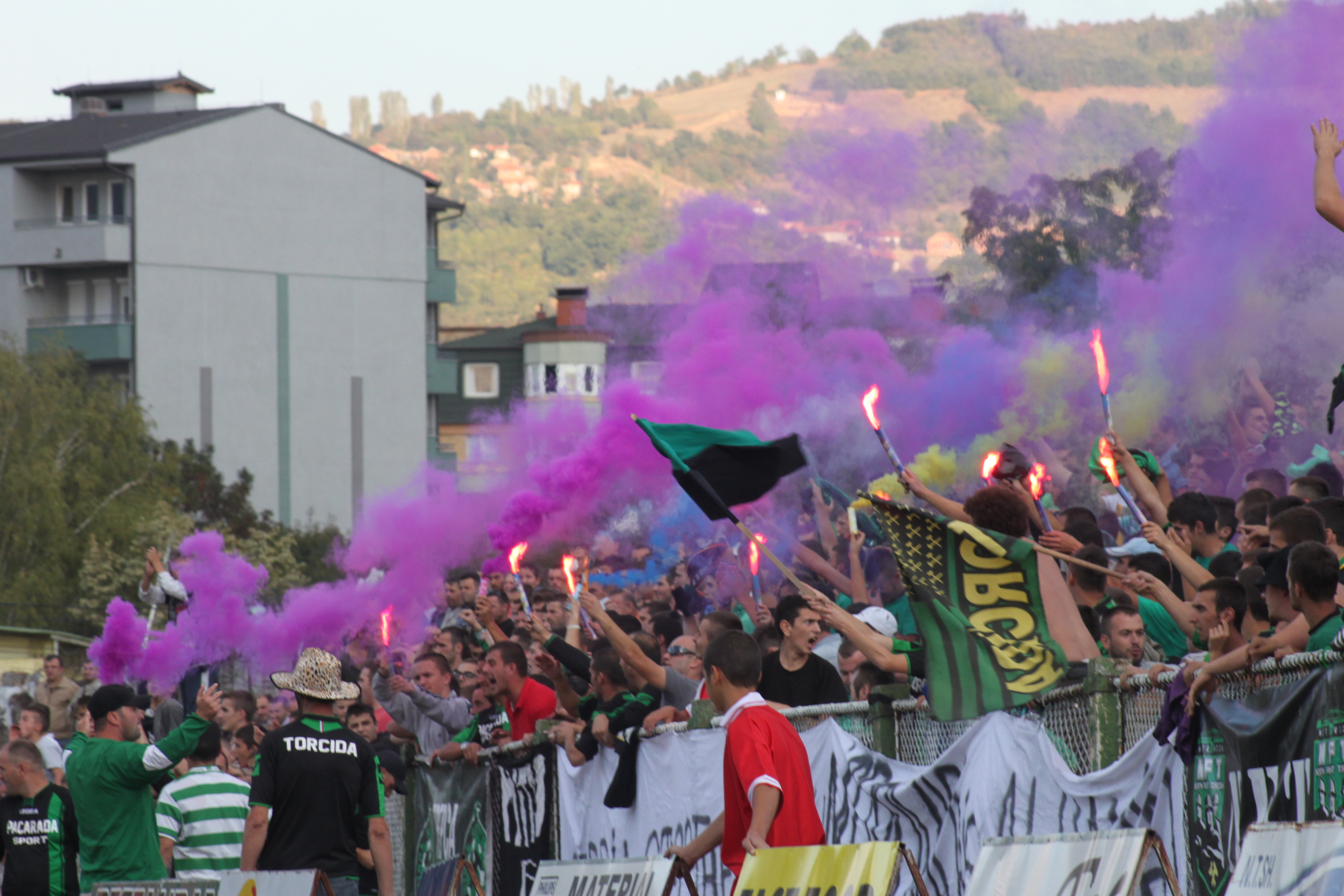 Tifozët mitrovicas reagojnë pasi skuadra e tyre Trepça '89 shënon gol.